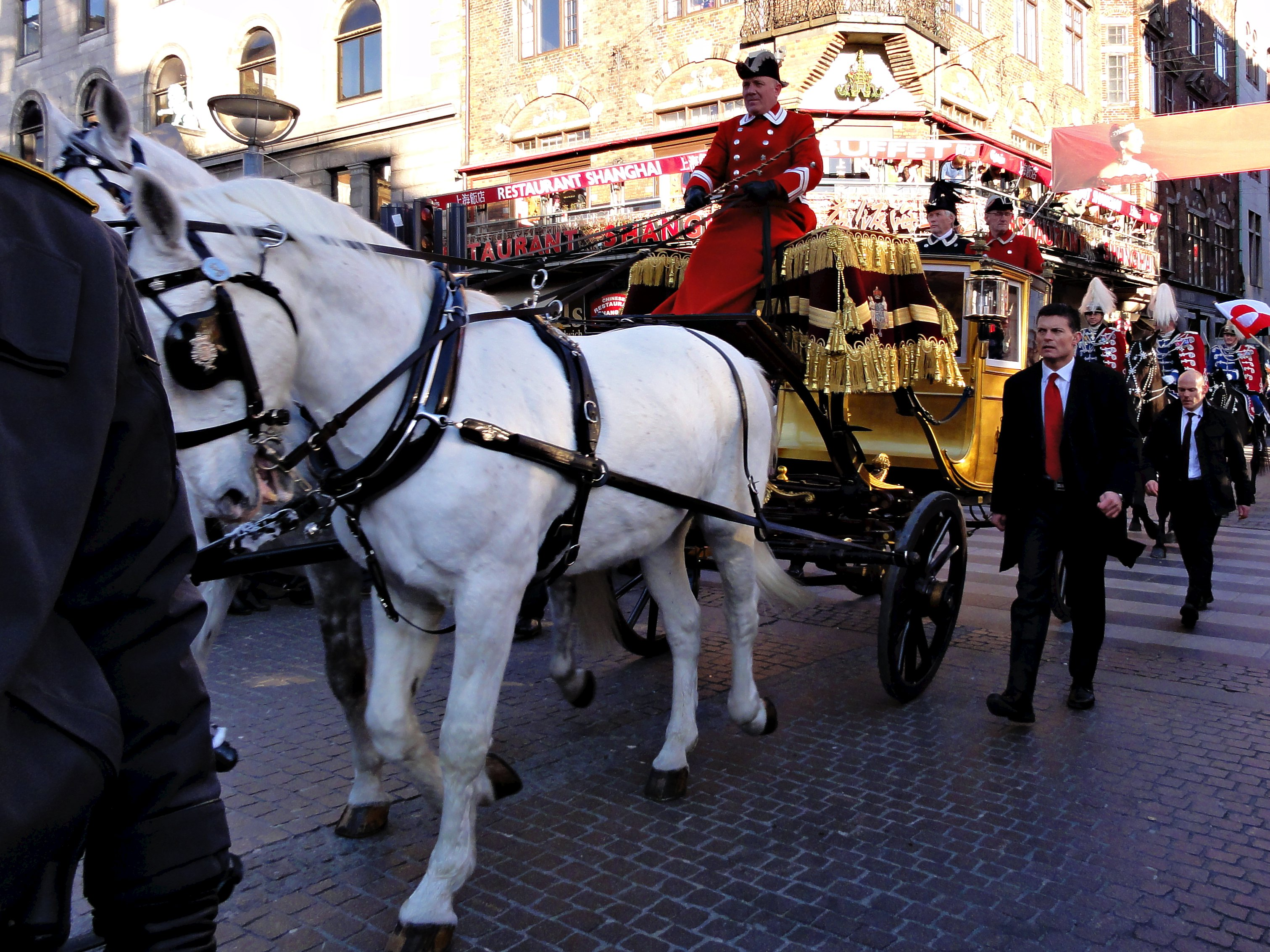 Celebração dos quarenta anos de reinado de Sua Majestade Dinamarquesa.